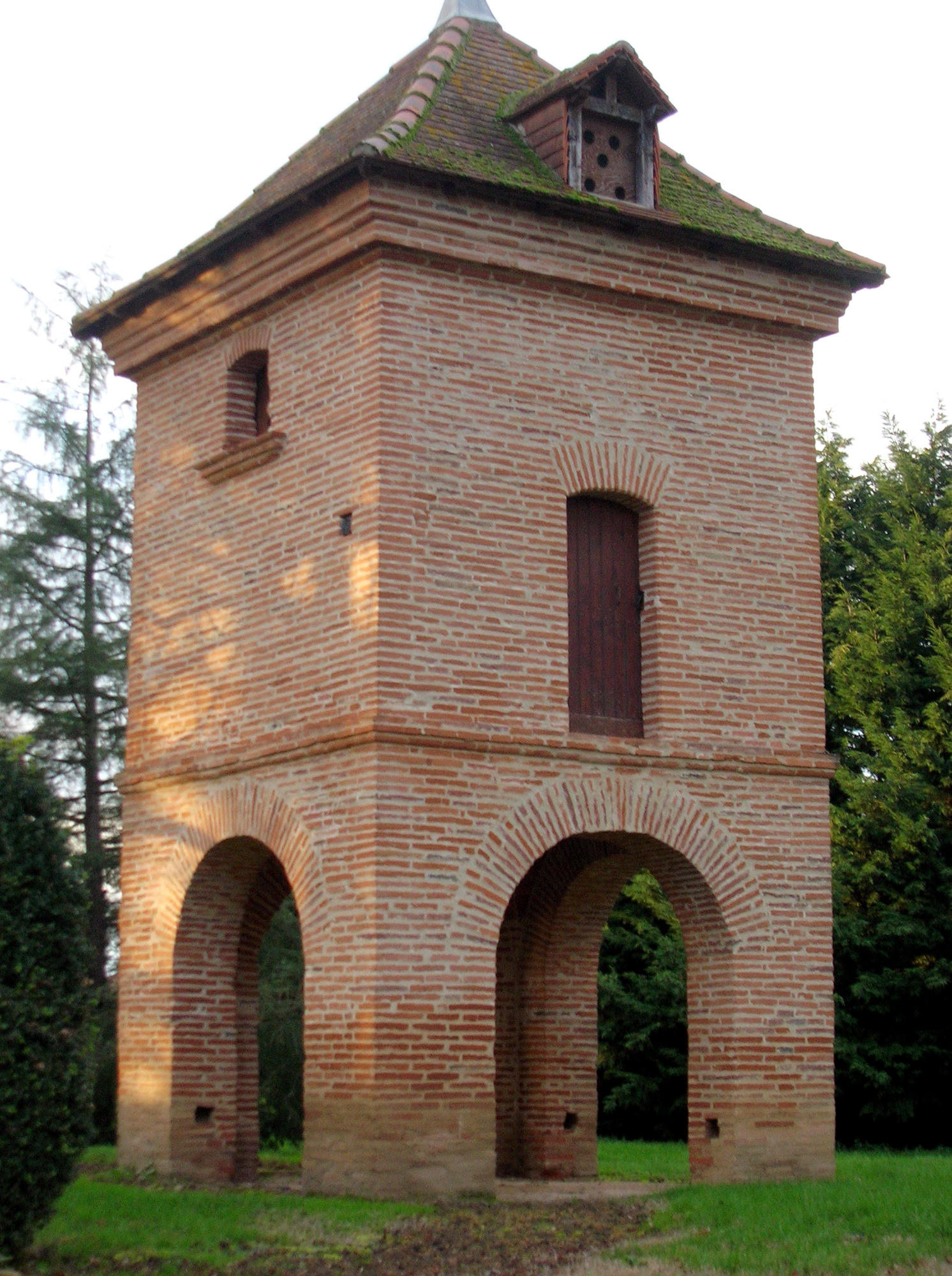 Pigeonnier en brique toulousaine de terre cuite rouge à Lagrave (Tarn, France), au bord de la D.6, entre l'échangeur autoroutier et Cadalen.